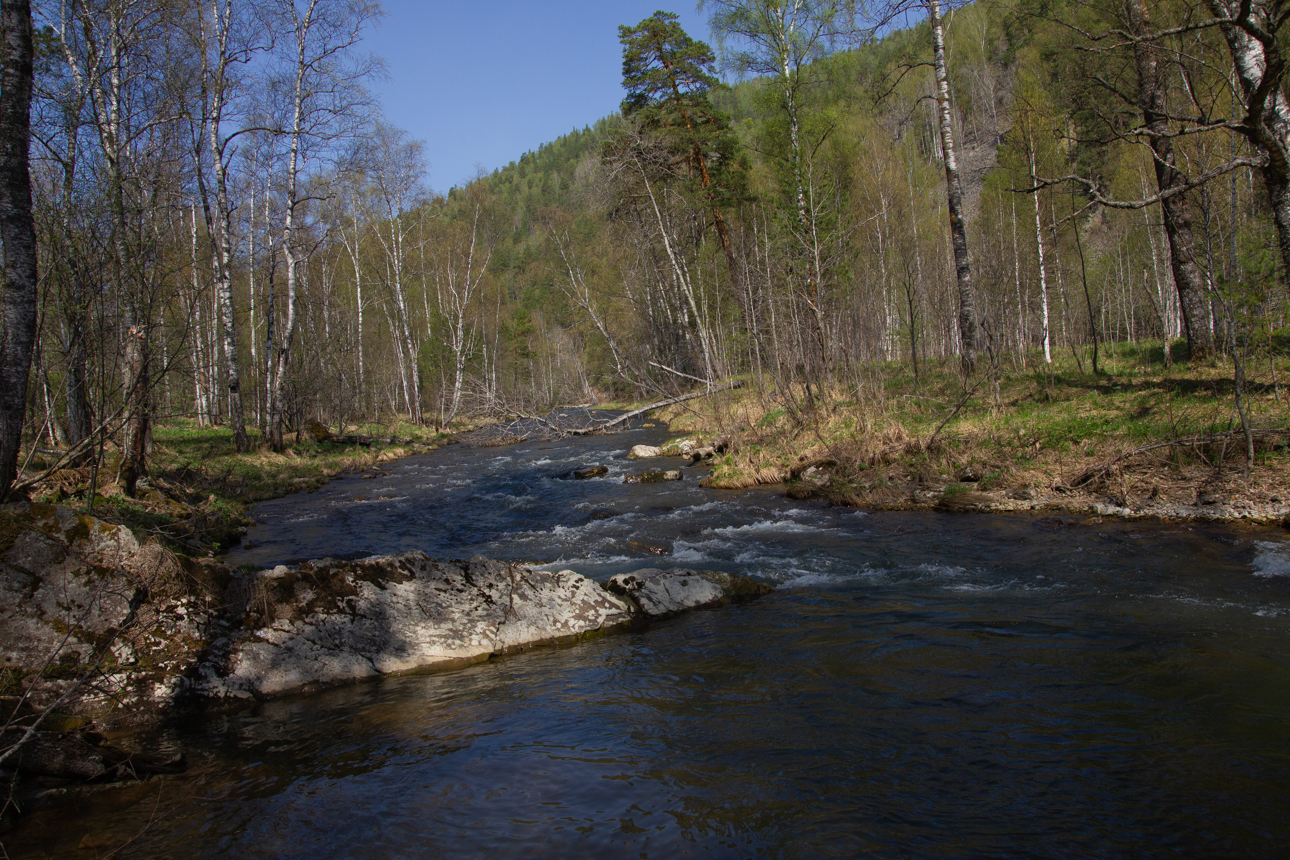 Река Казмаш